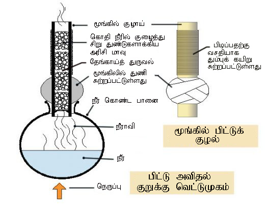 பகுப்பு:தமிழில் விளக்க வரைபடங்கள்